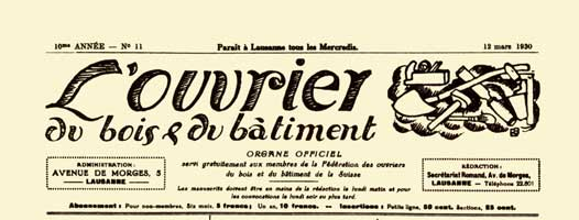 "L'Ouvrier du bois et du bâtiment" organe officiel en langue française de la F.O.B.B "Fédération des Ouvriers du Bois et du Bâtiment" en Suisse Romande.